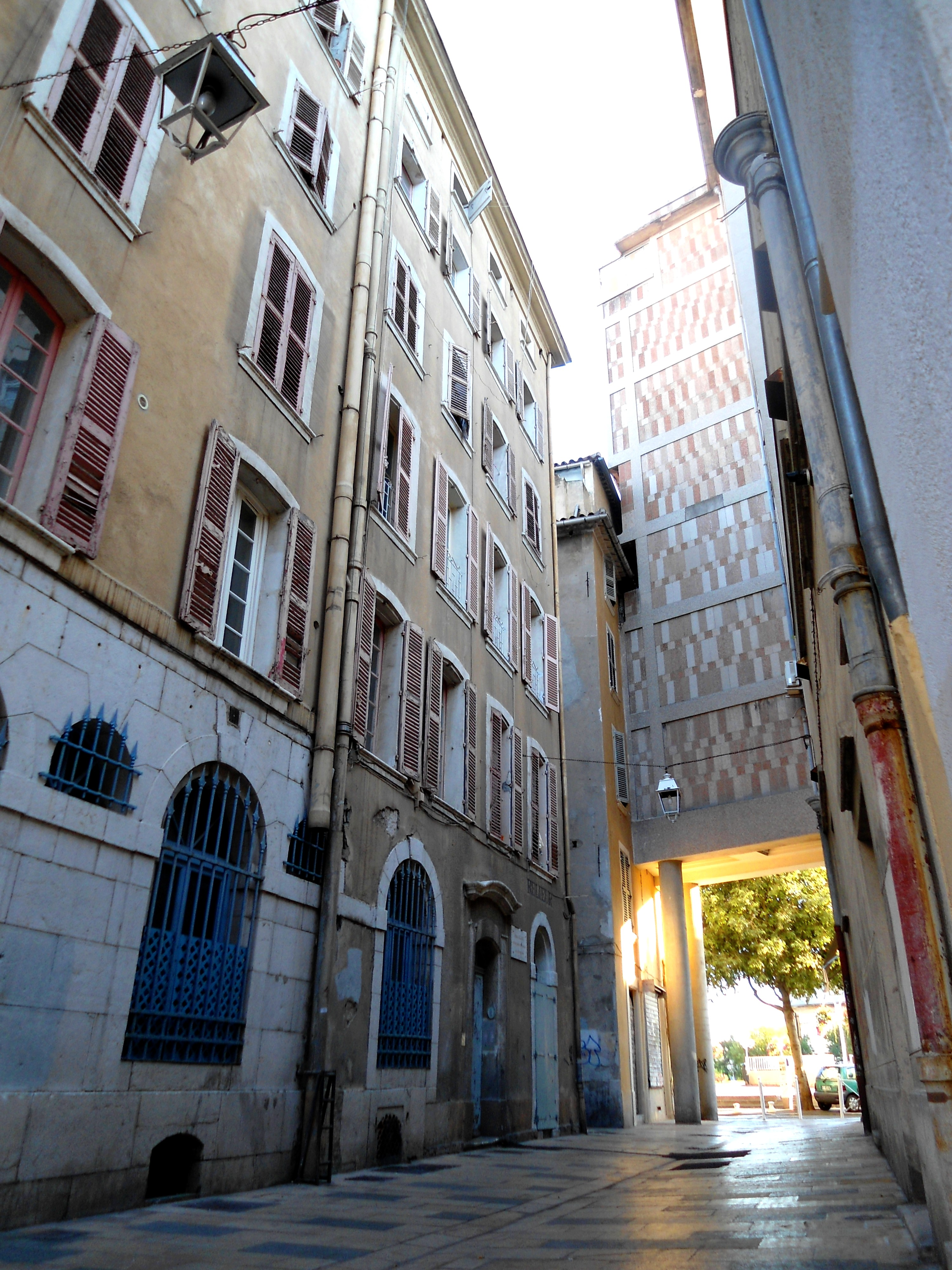 Runa Simi: Jean Aicardpa (prowinsyapa quellqan) wasin Tulunpi